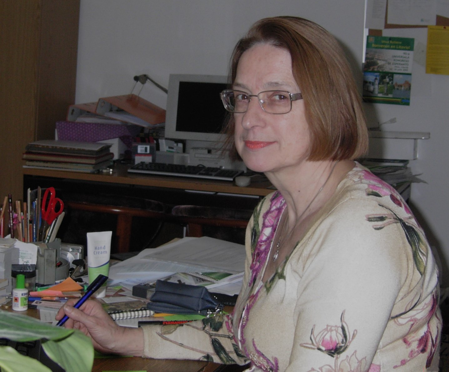 Spomenka Štimec en sia oficejo.